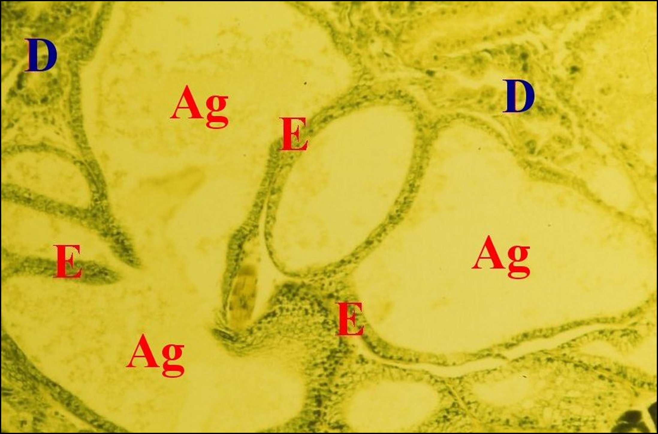 Grand développement des glandes à soie agrégées chez une femelle de Mastophora cornigera